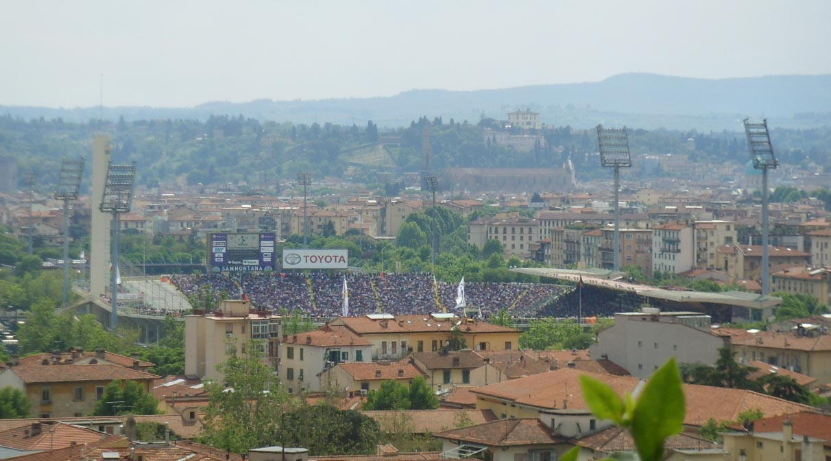 Stadio artemio franchi, firenze, view